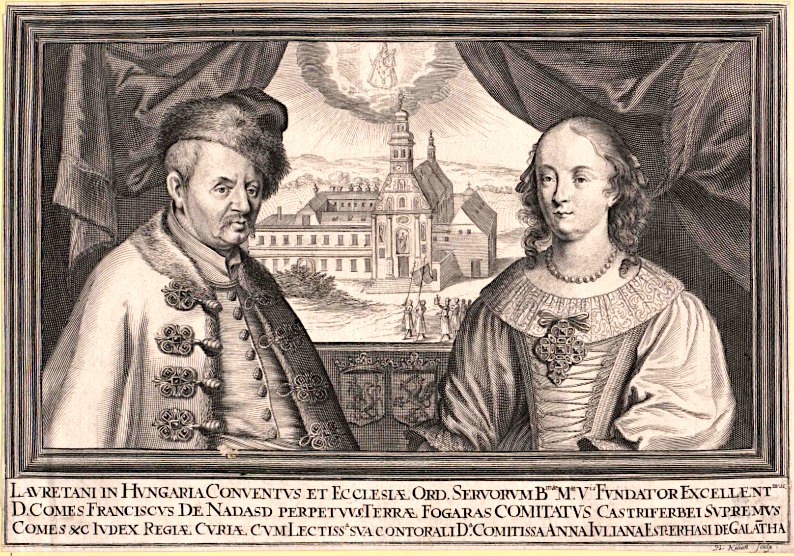 Nádasdy Ferenc országbíró és neje, Eszterházy Julianna - rézmetszet